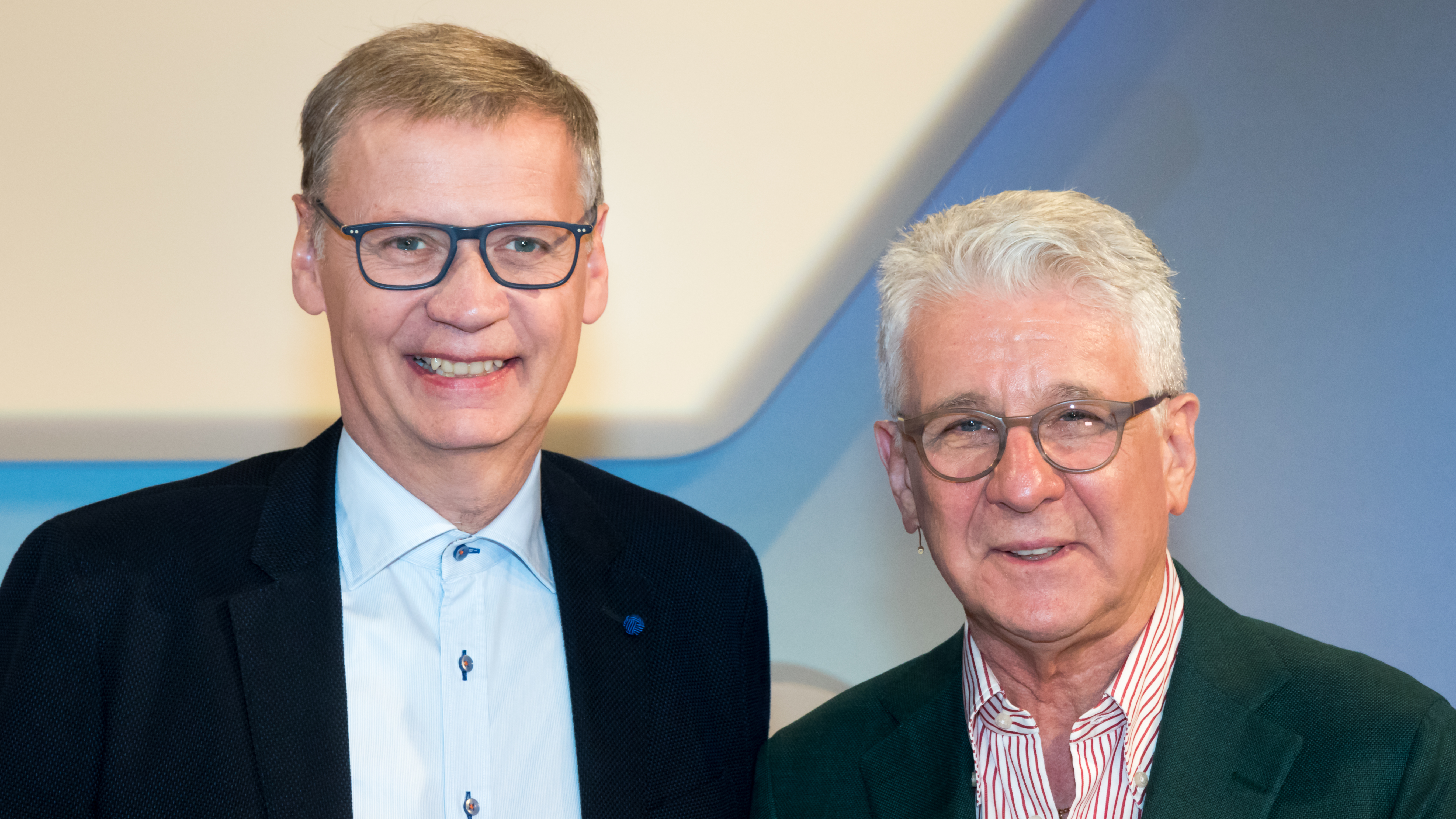 „maischberger. die woche“ am 13. November 2019 in Köln. Produziert vom WDR. Foto: Günther Jauch (Fernsehmoderator) und Marcel Reif (Sportkommentator)